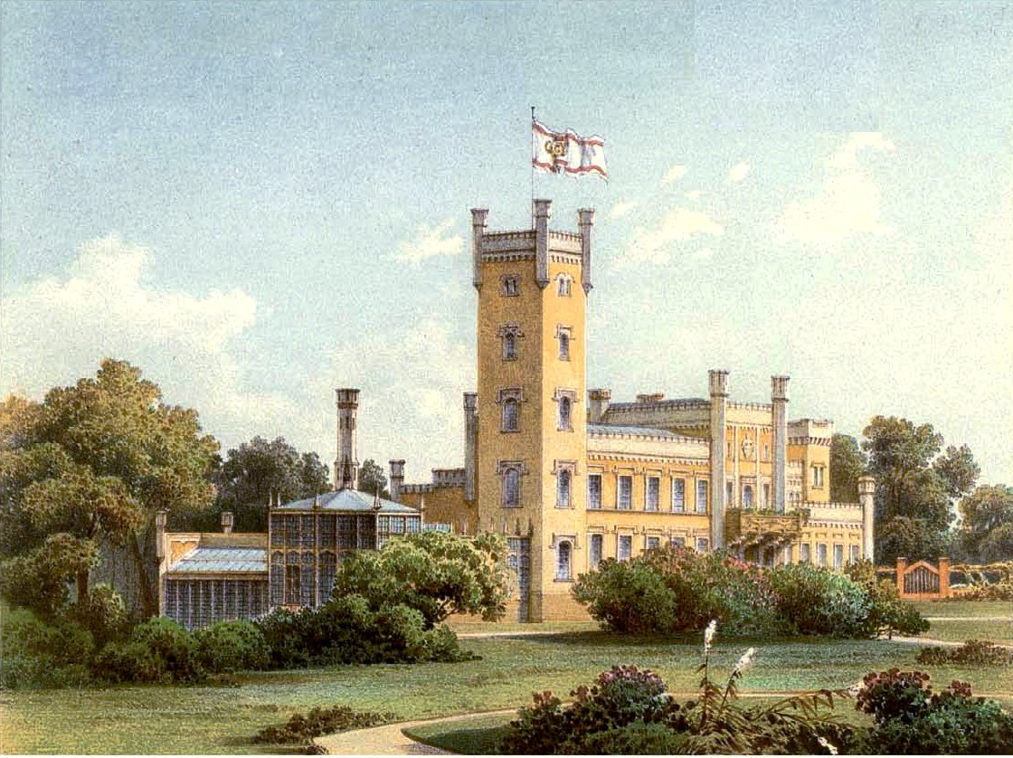 Schloss Hohenlandin